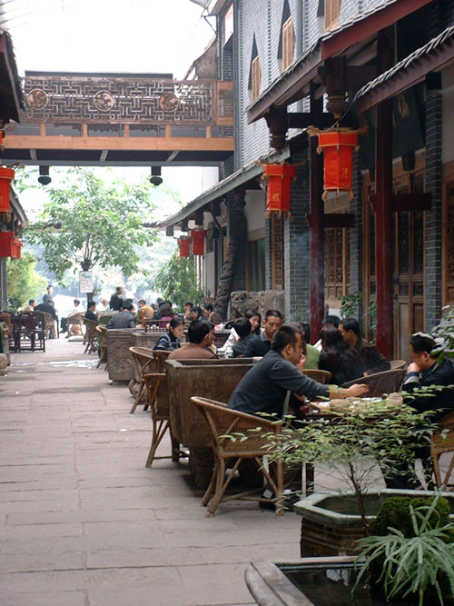 Teehaus in Chengdu (eigene Aufnahme 2003, GFDL)